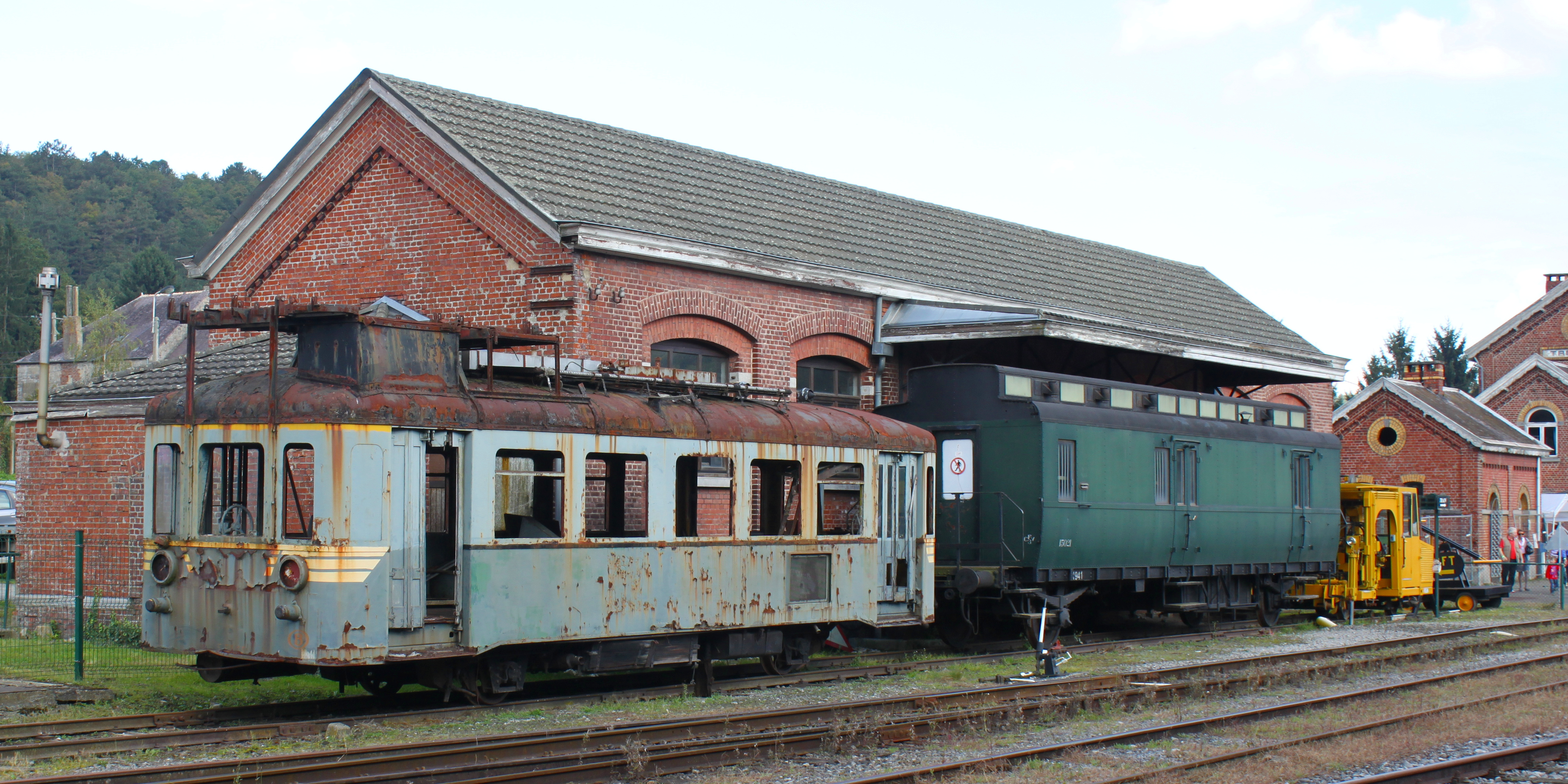 L'autorail brossel 551.15 de la SNCB, qui fut transformé en autorail caténaire ES303, vu au CFV3V ou il doit servir de banque d'organes pour le 551.34